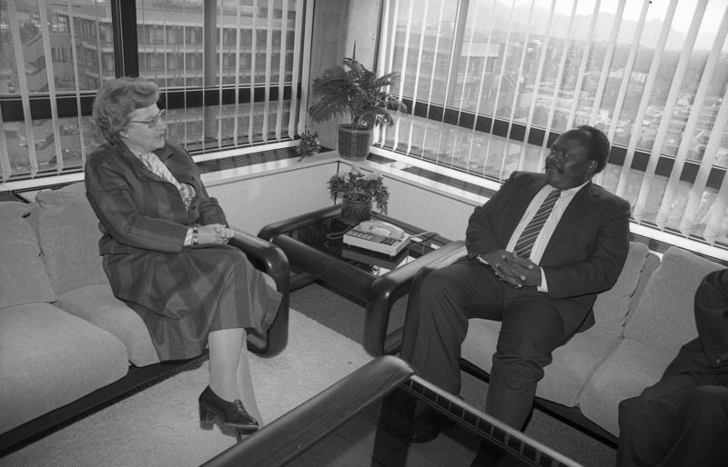 15.-17.12.1986 Besuch des Erziehungsministers von Kenia, Peter Oloo Aringo, in Bonn 16.12 Gespräch mit Bundesministerin Dr. Dorothee Wilms im Bundesministerium für Bildung und Wissenschaft